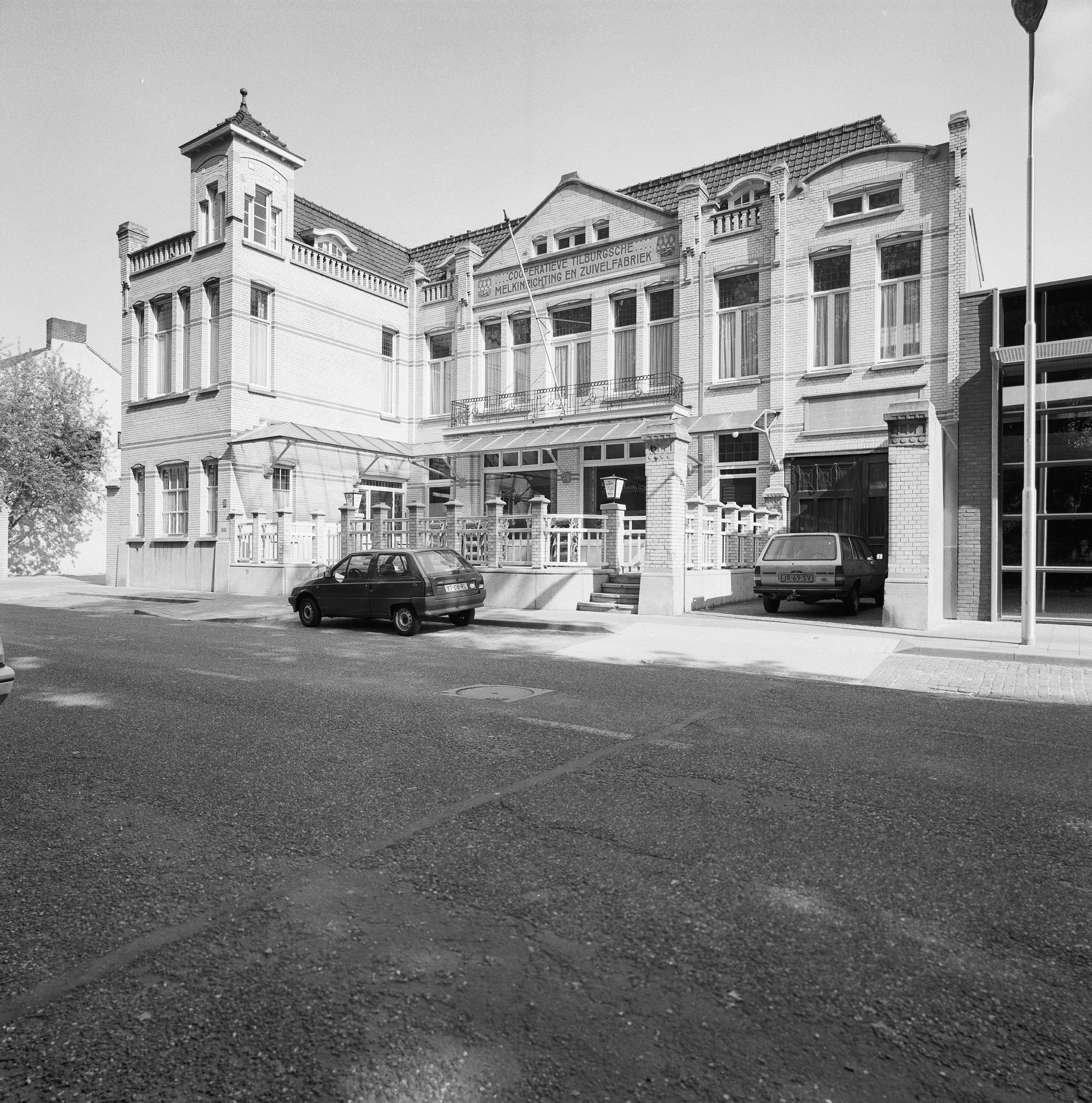 Voormalige Coöperatieve Tilburgsche Melkinrichting En Zuivelfabr: Overzicht voorgevel fabriek (opmerking: Gefotografeerd voor Monumenten In Nederland Noord-Brabant, bladzijde 309)